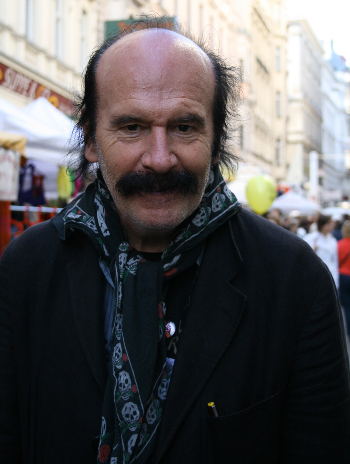 Der österreichische Musiker Stefan Weber, Kopf der Rock/Punk-Band Drahdiwaberl / Austrian musician Stefan Weber, head of the rock/punk-band Drahdiwaberl